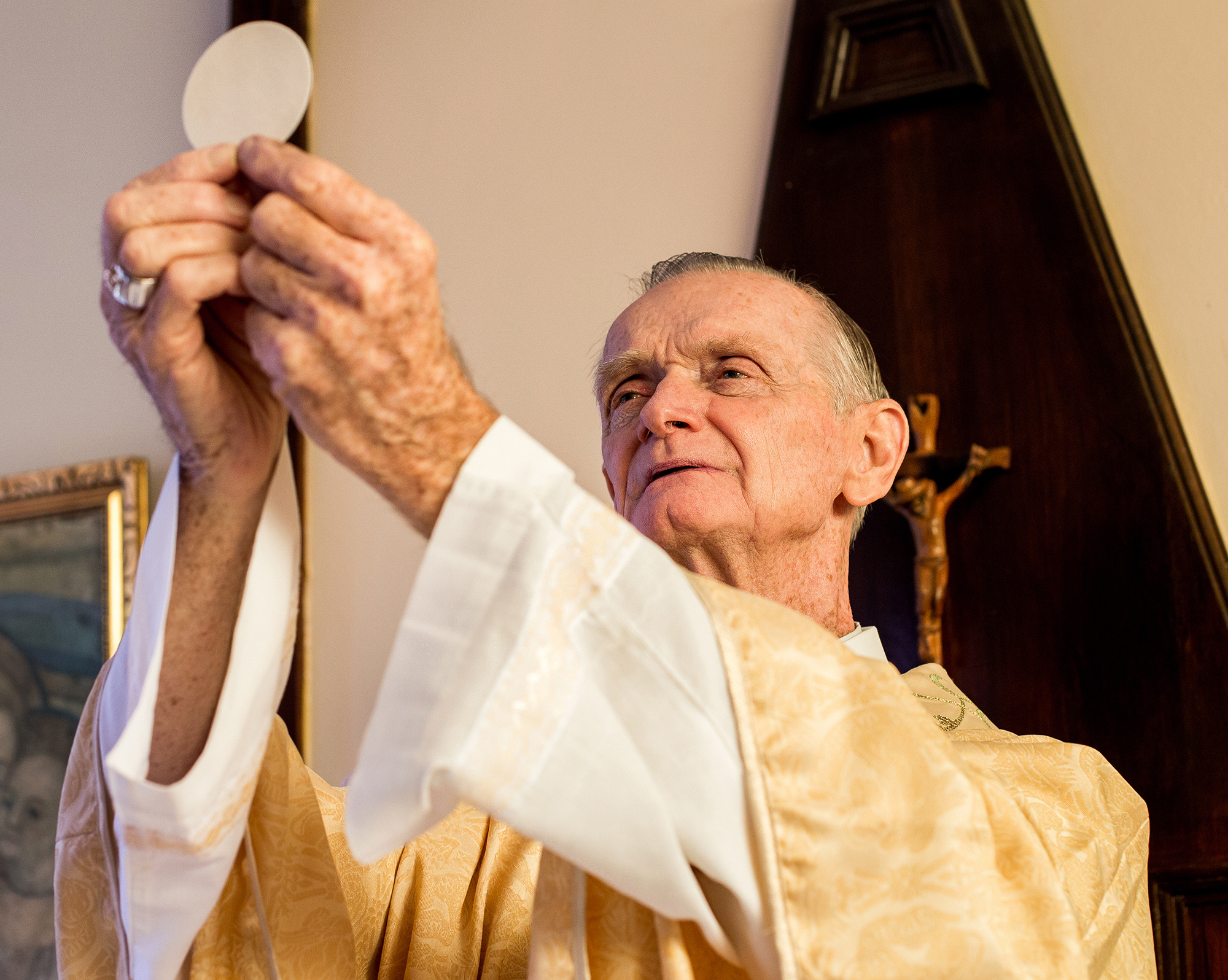 Monseñor Daniel Turley, Obispo de la Diócesis de Chulucanas.Depicted person: Daniel Thomas Turley Murphy – bishop of the Diocese of Chulucanas in the Piura Region of Peru